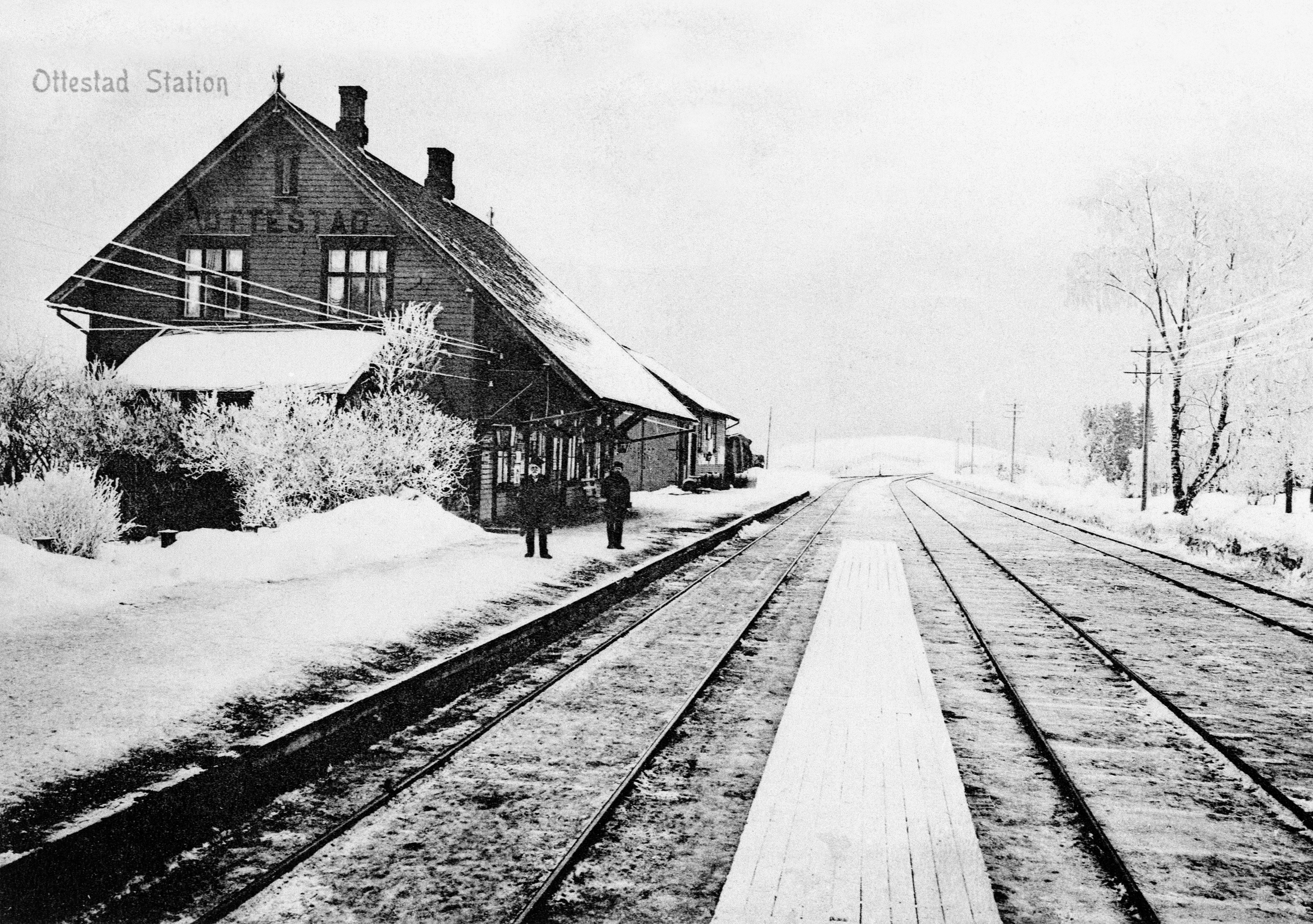 Eksteriør fra Ottestad stasjon om vinteren, ca. 1905–1910. Fotograf iflg. Digitalt museum: Larsen-Normann. Fra Domkirkeoddens fotoarkiv. Inventarnummer: 0417-03926.